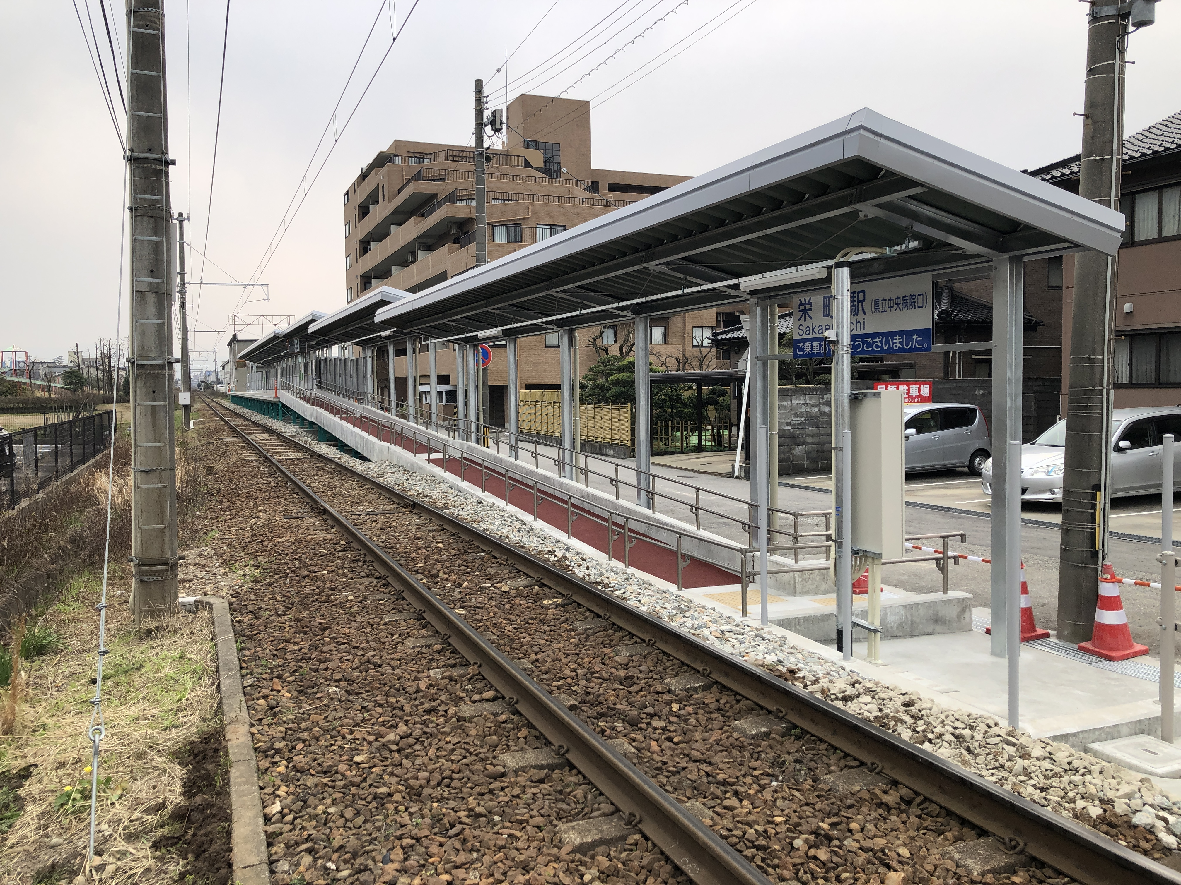 富山地方鉄道不二越線栄町駅